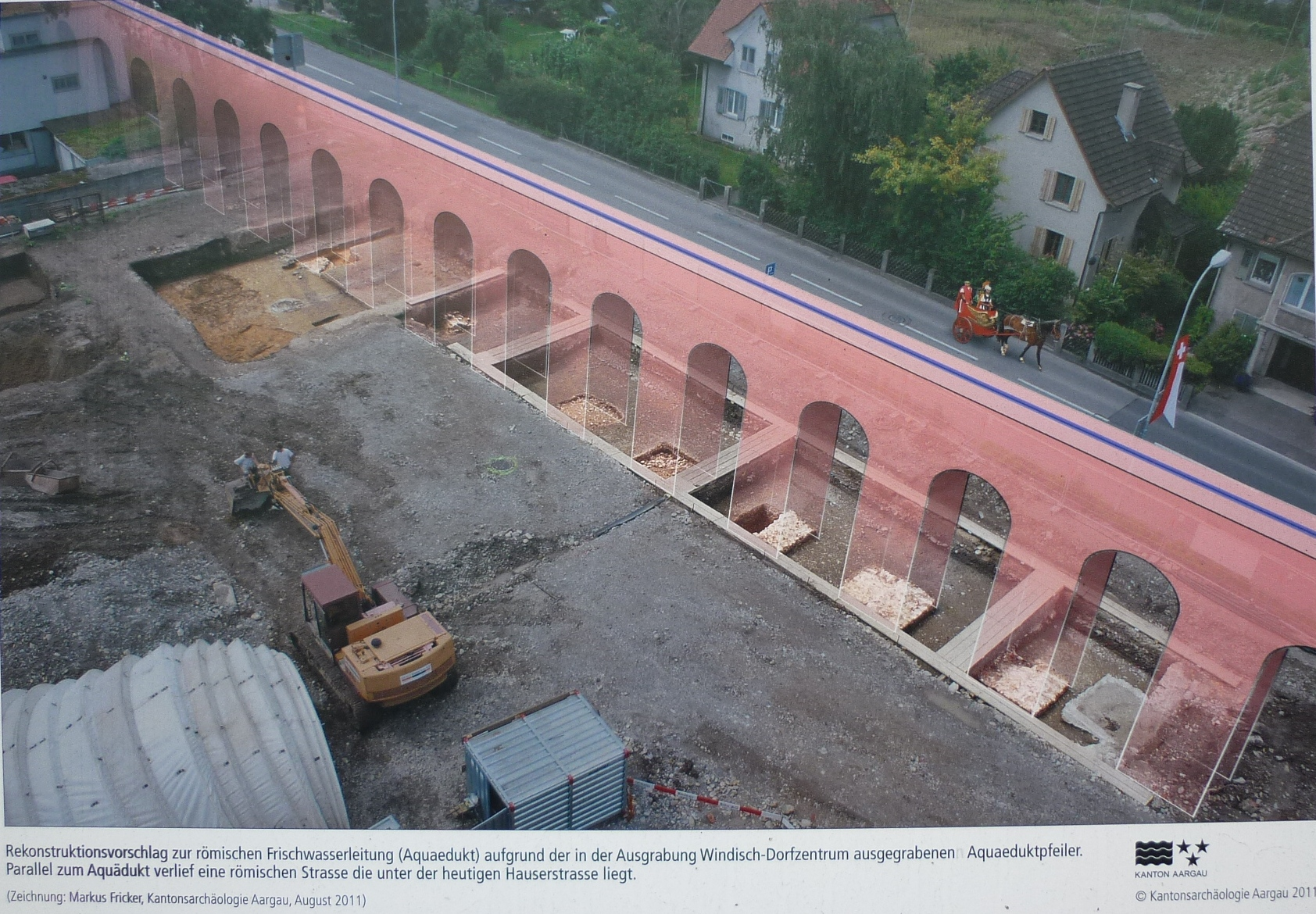 Ausgrabungen des Aquaeduktes in Vindonissa, Windisch AG, Schweiz